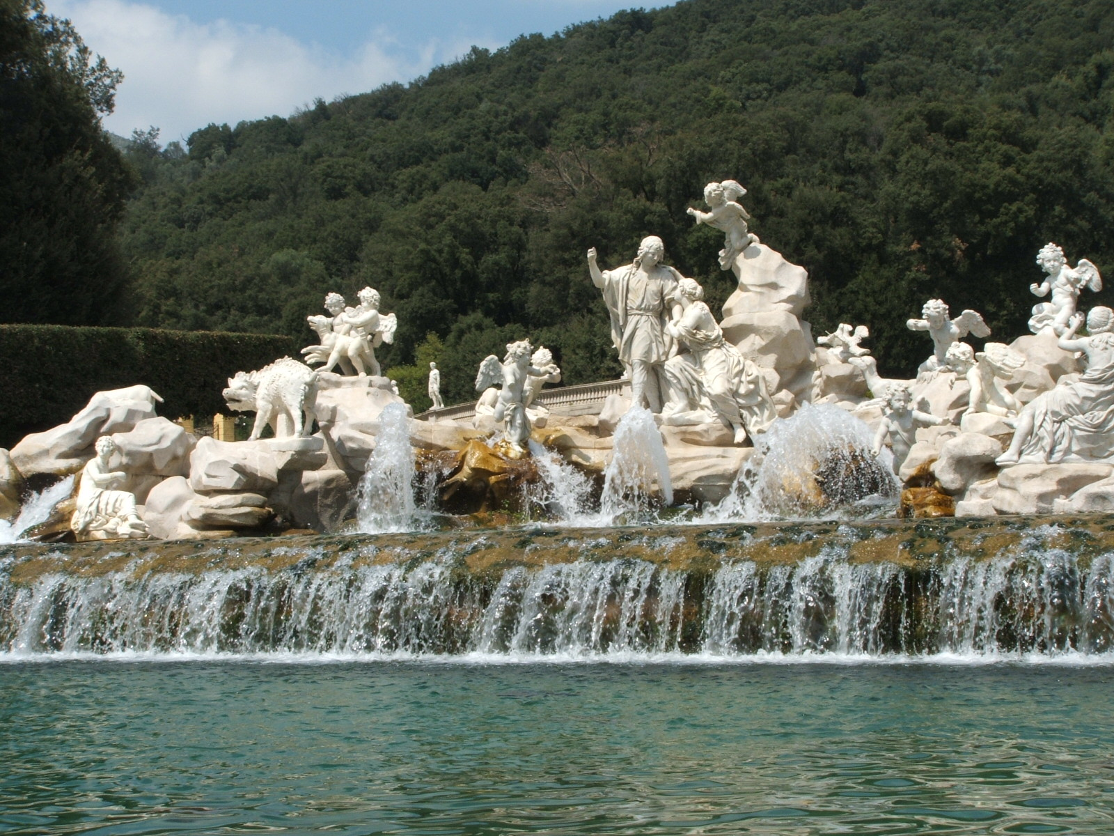 Immagine dalla Reggia di Caserta, Caserta, Campania, Italia. Statue e fontane nel parco